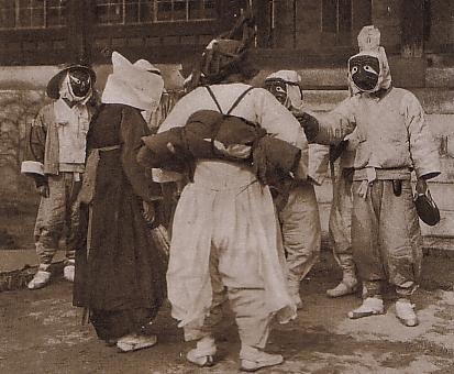 Korean mask play（仮面戯 탈춤）